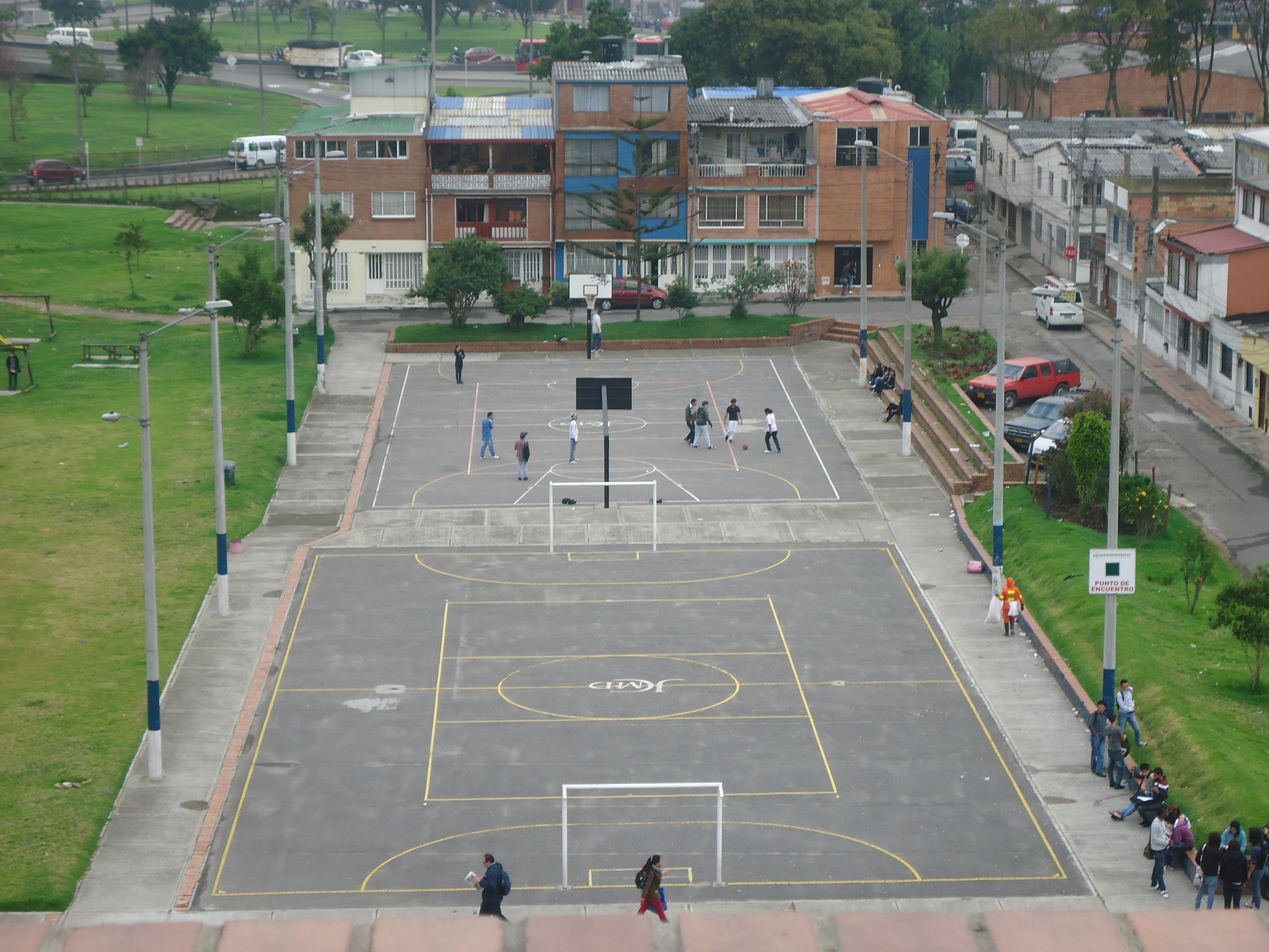 Cancha para "U al parque"